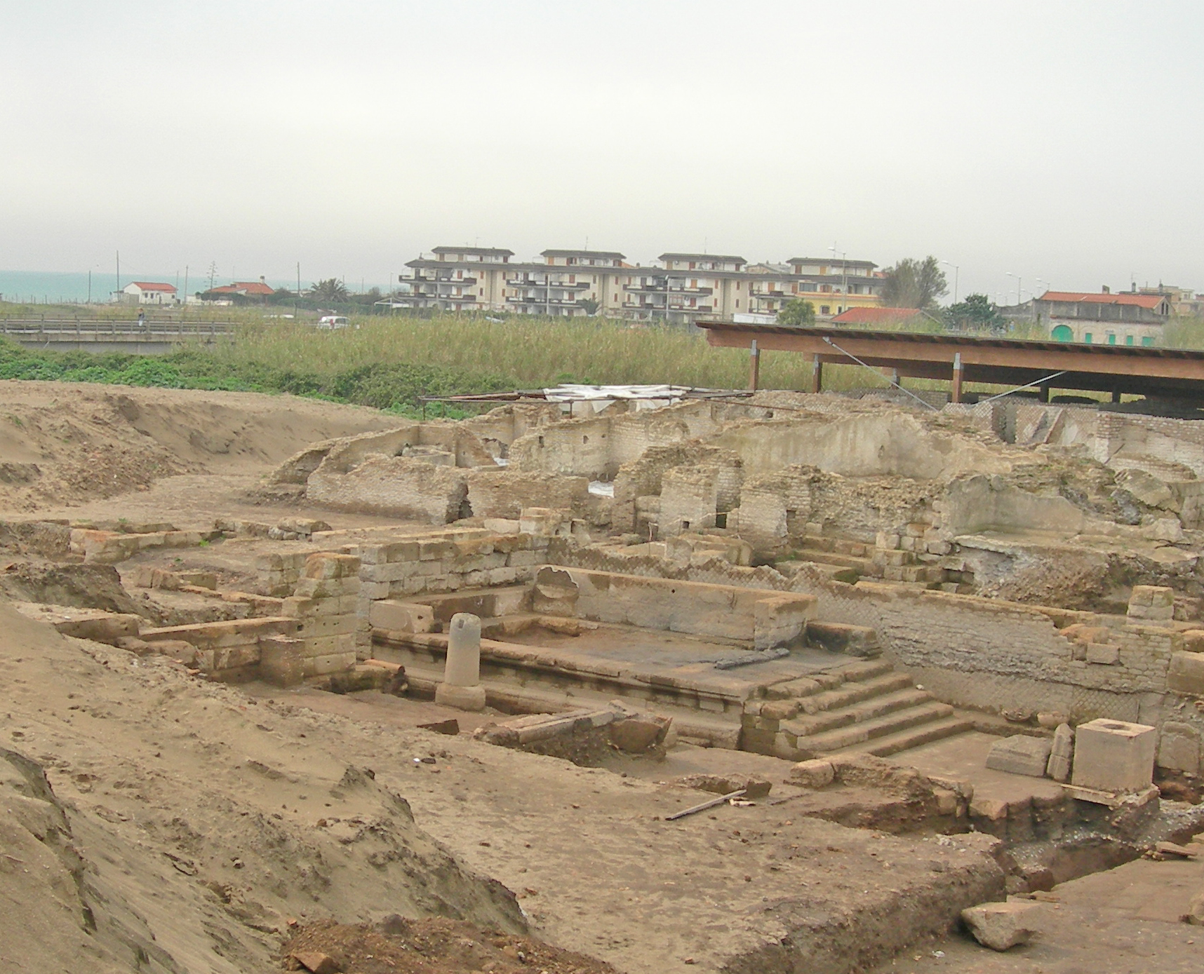 Castrum Inui, panoramica degli scavi, aprile 2007. Autore: Silvia Matricardi, Associazione Informare